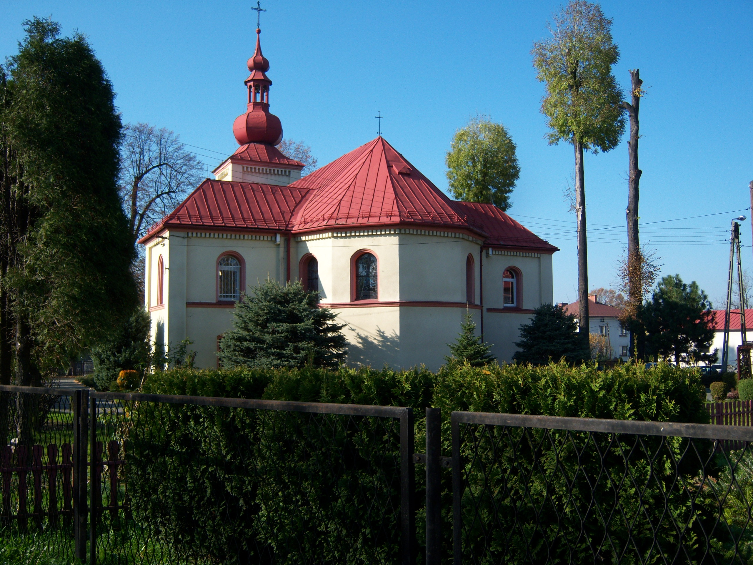 Kościół Świętej Trójcy Wisła Wielka